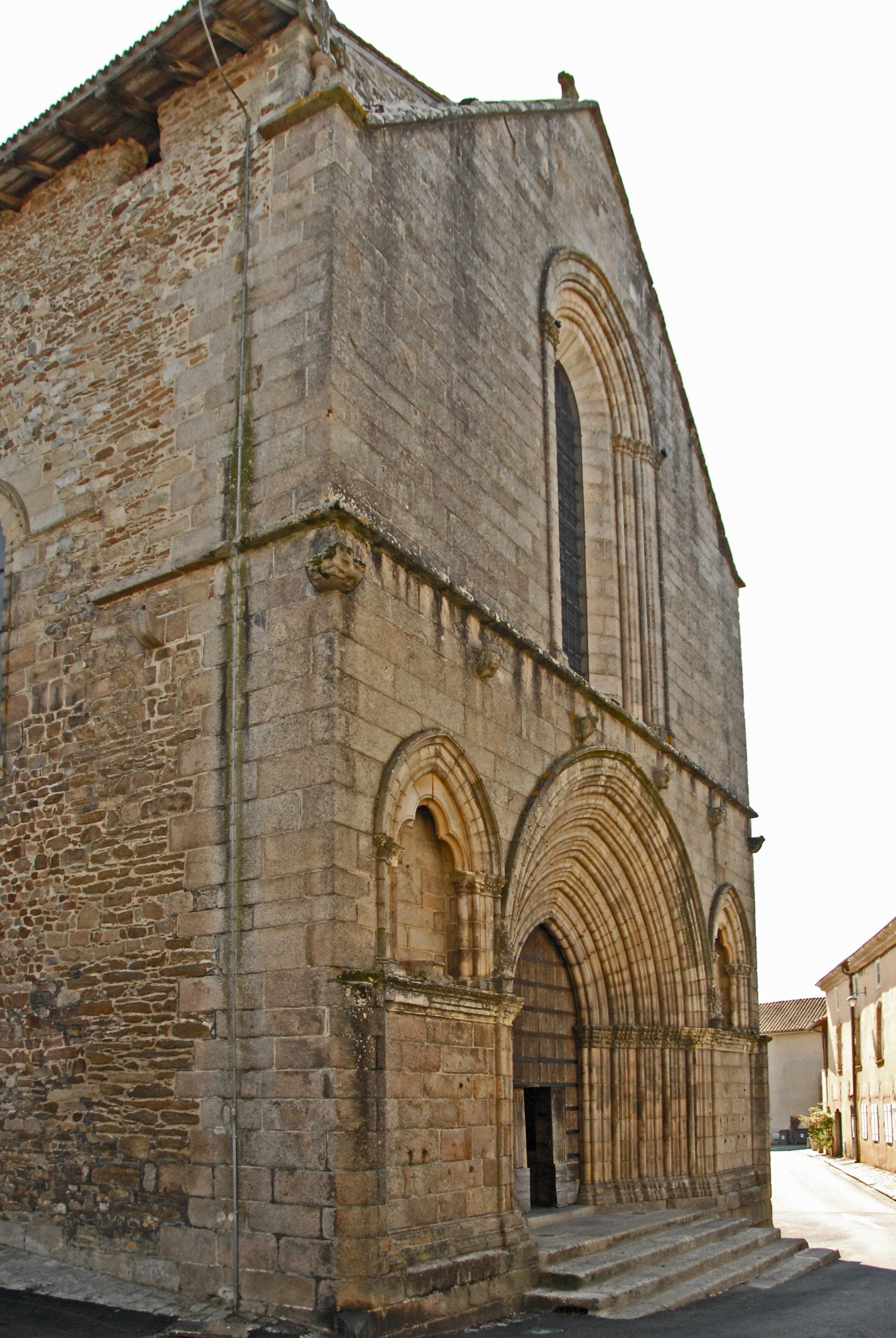 Stiftskirche St.-Léonard-de-Noblat, Westfassade, von NW